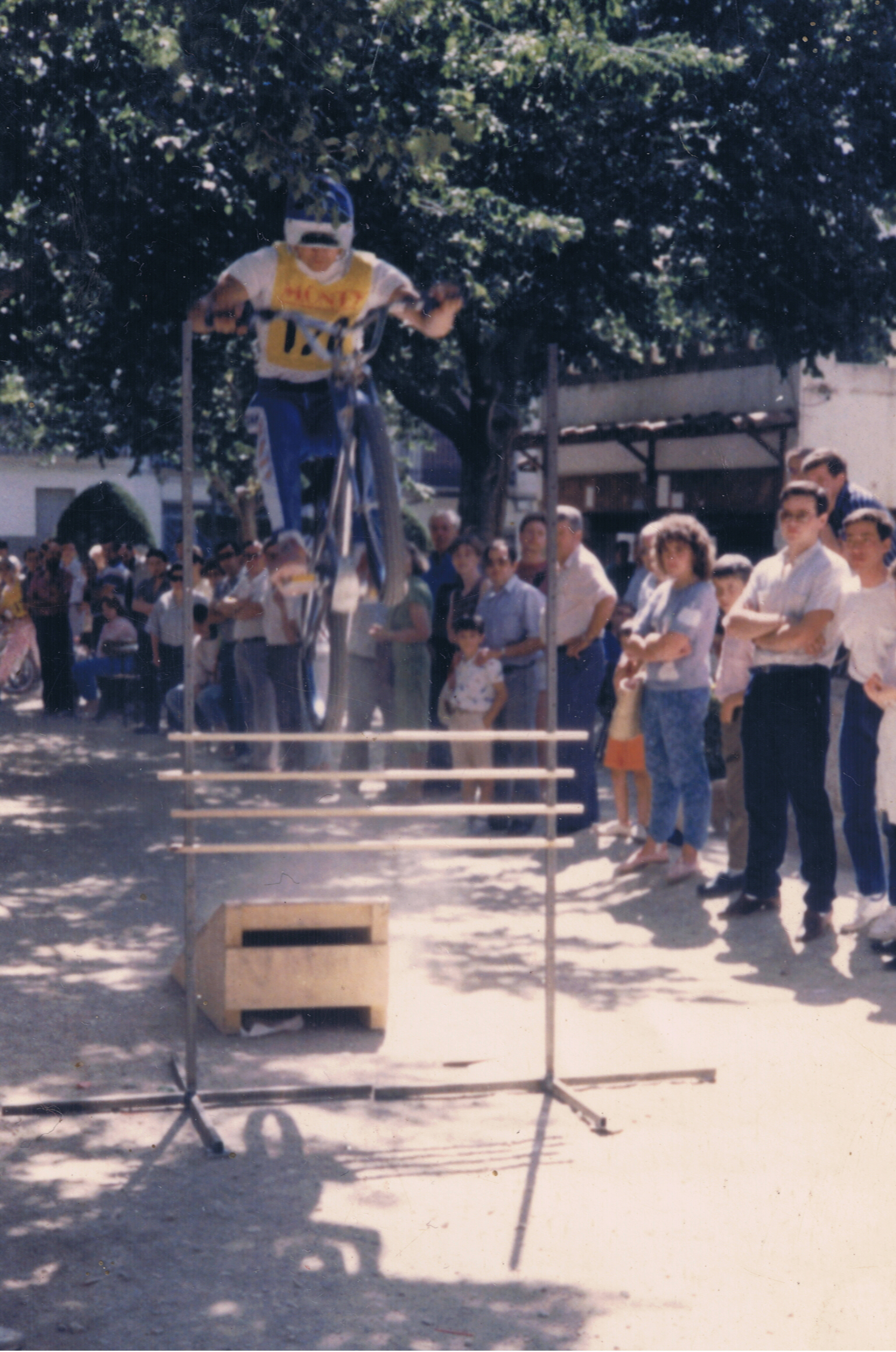 Corresponent a la 1ª Prova del campionat d'Espanya de trialsin (biketrial) del municipi de Morella a Castelló. 1986